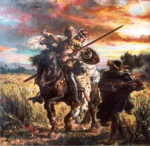 Bolesław II Rogatka z Zofią z Doren i grajkiem